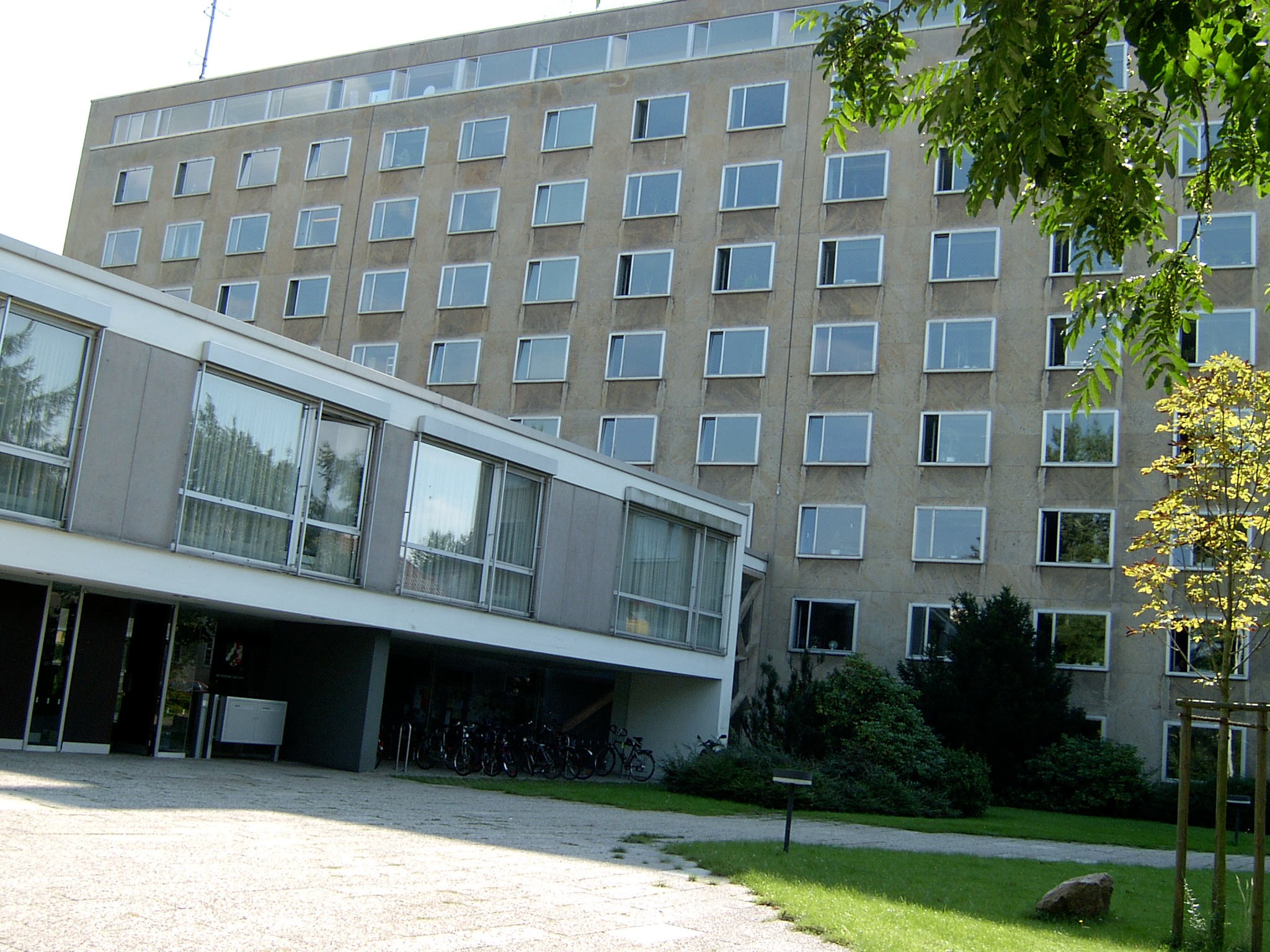 Gebäude der Bezirksregierung in Detmold